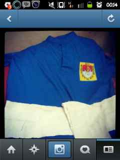 seragam THS